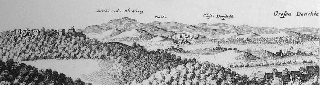 Assseburg auf Merian Stich 1654